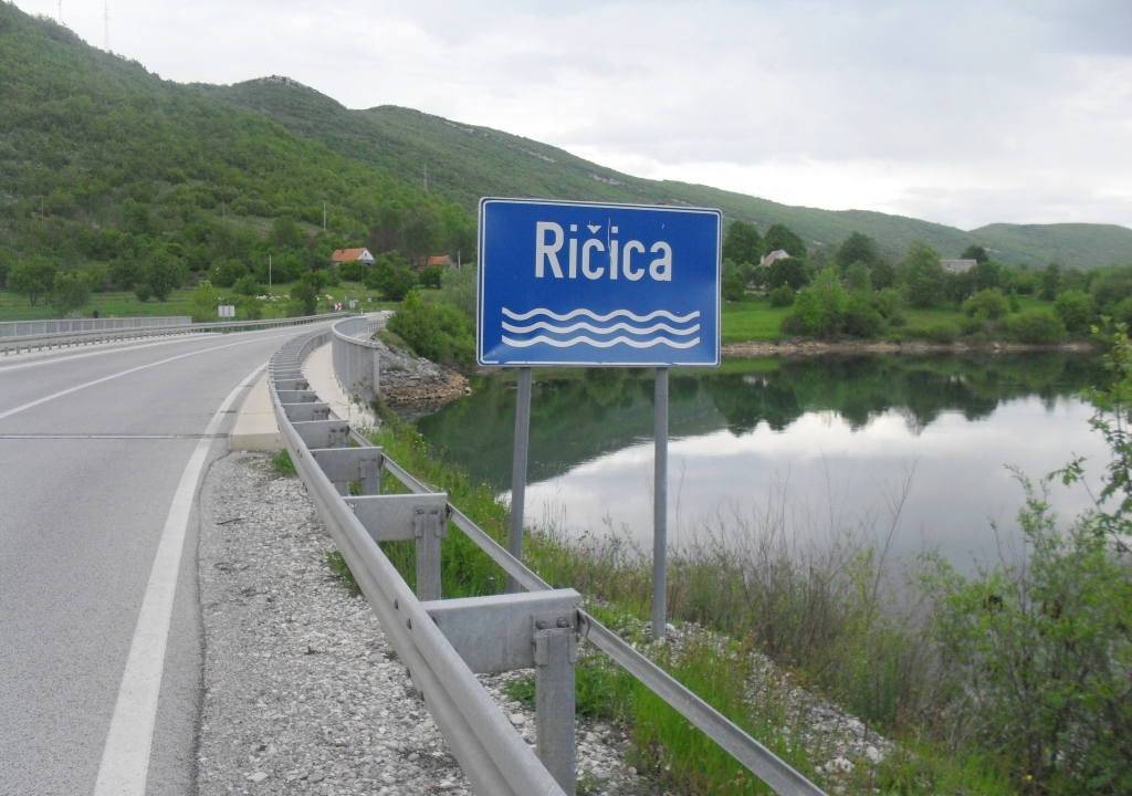 Ријека Ричица у насељу Штикада, Лика.